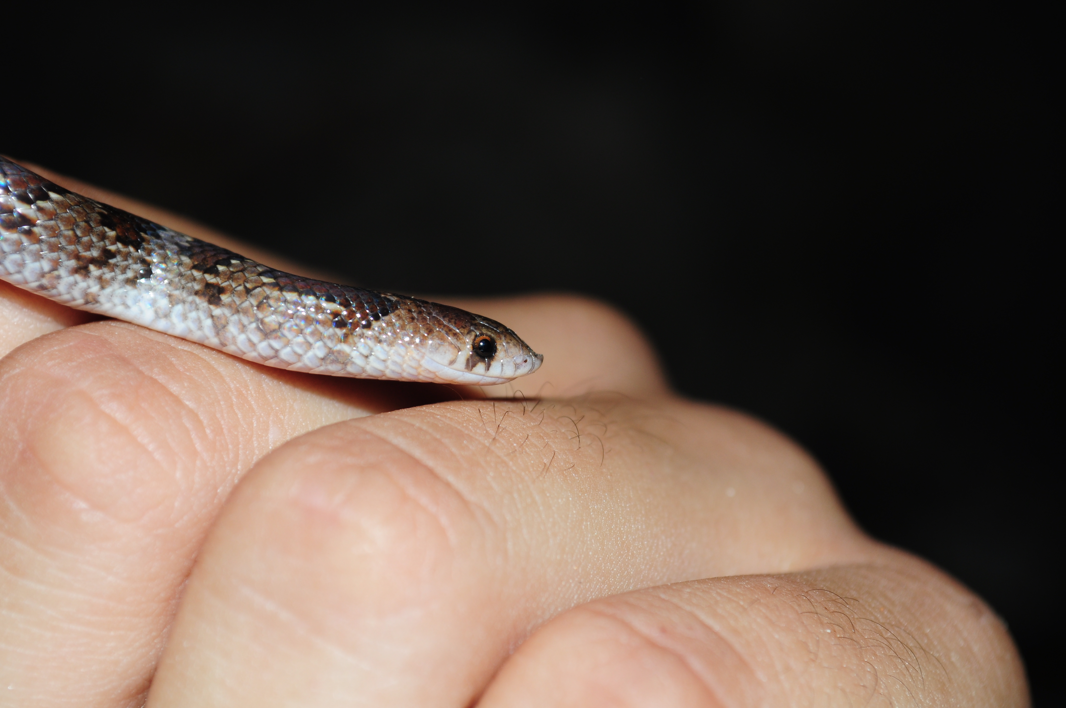 Ficimia publia